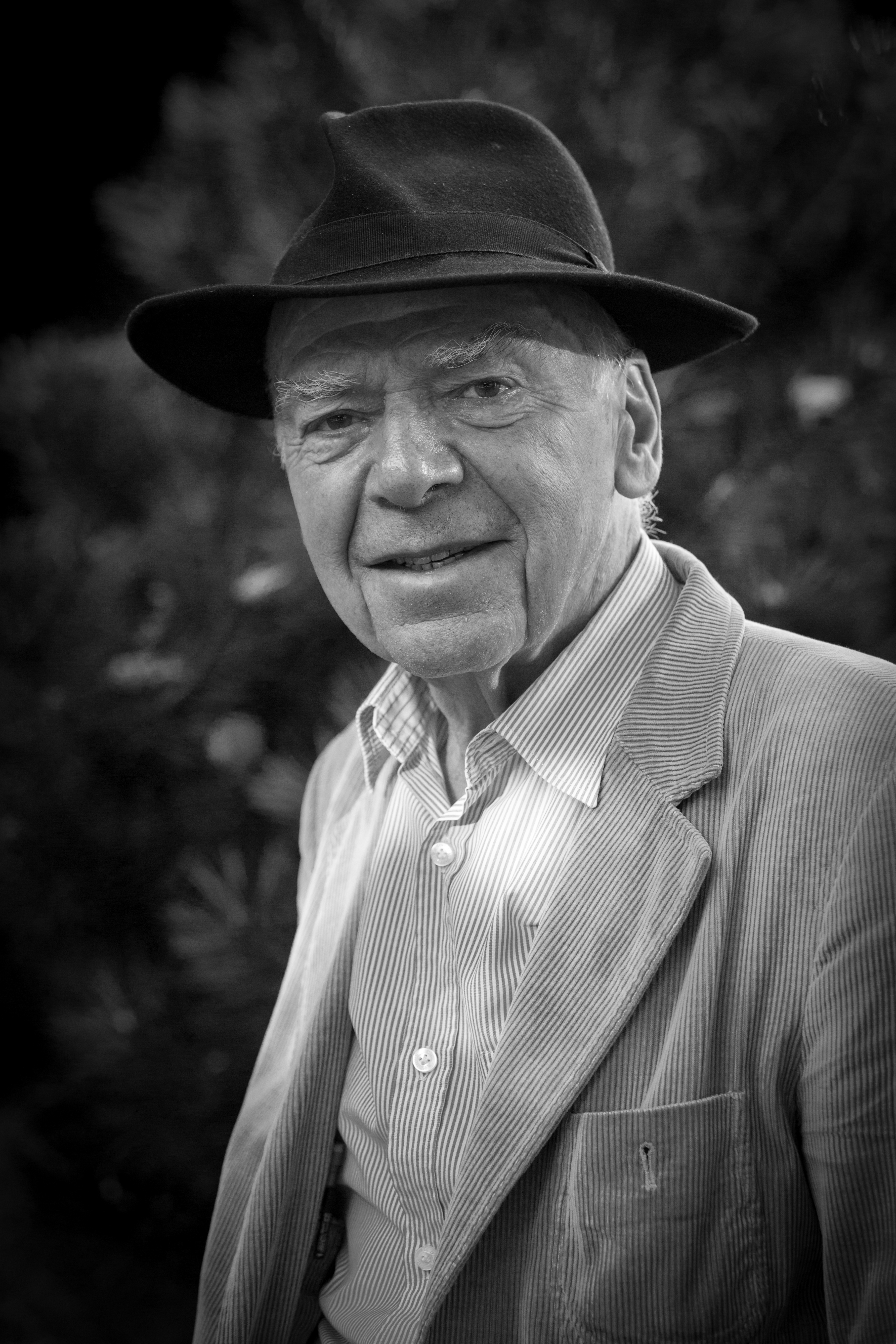 Bernard Ollivier par Claude Truong-Ngoc octobre 2015